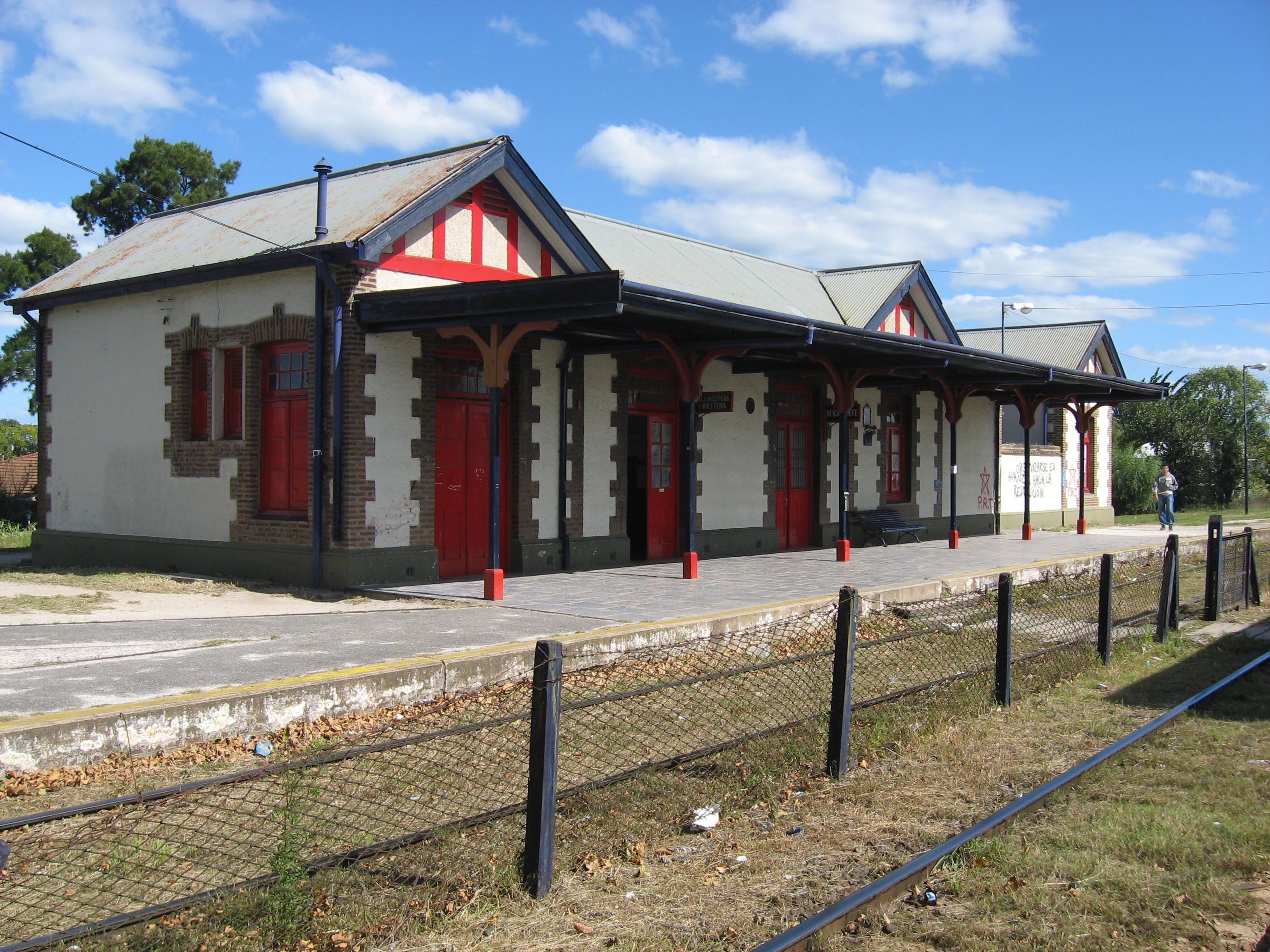 Estación Ringuelet del Ferrocarril Roca, partido de La Plata, provincia de Buenos Aires, Argentina.